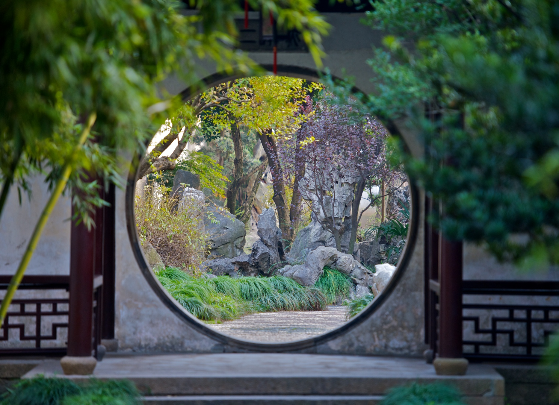 Lingering Garden, Suzhou. 留园。